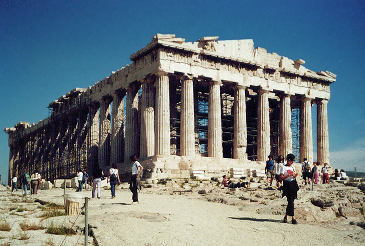 Der Parthenon in Athen